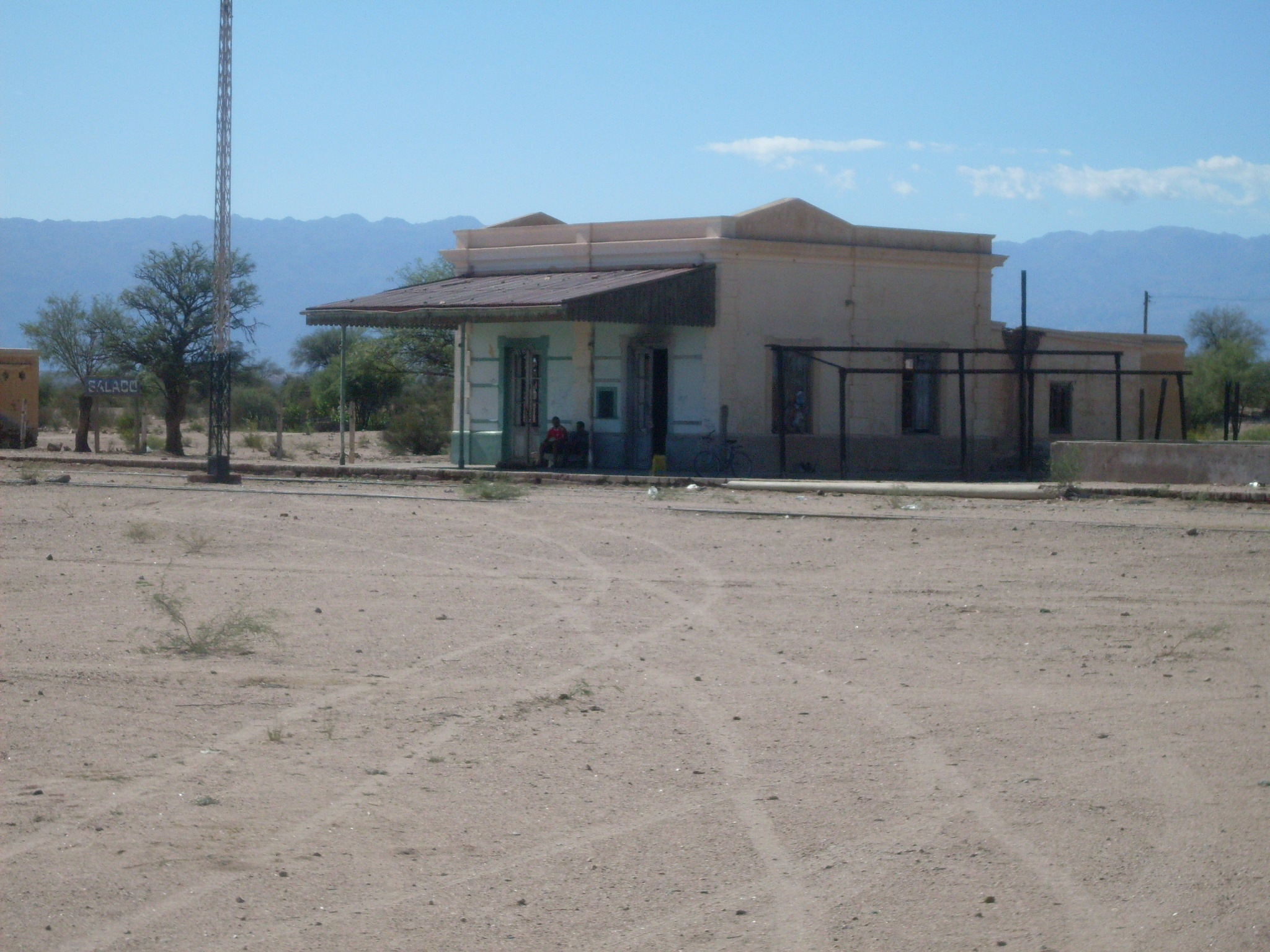 Estación Salado, provincia de Catamarca, Argentina.